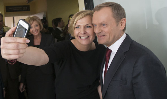 EPP Poznań - Szczyt regionalnych przywódców EPL